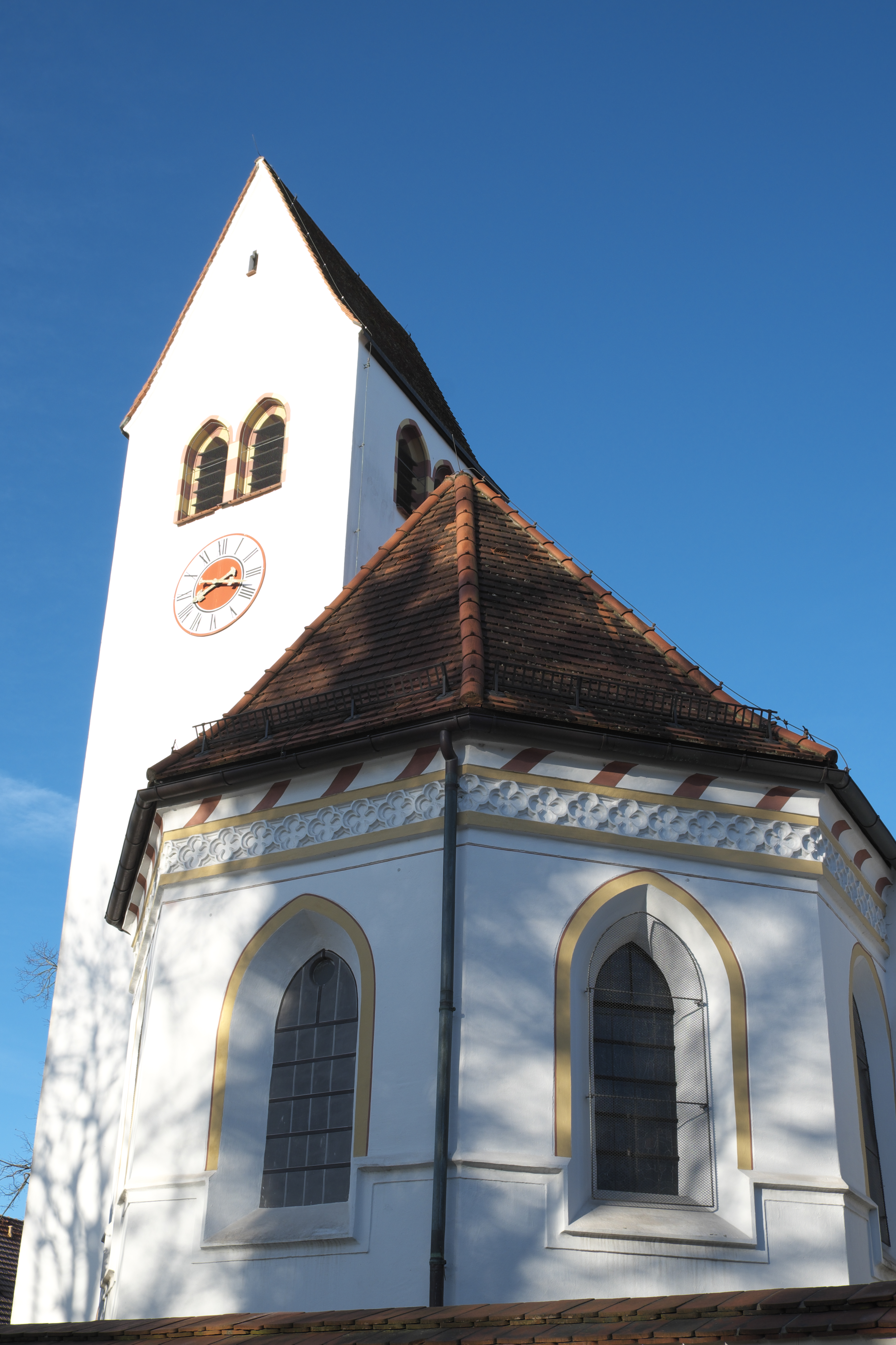 Alte katholische Pfarrkirche St. Stephan in Gräfelfing im Landkreis München (Bayern/Deutschland), Chor und Turm